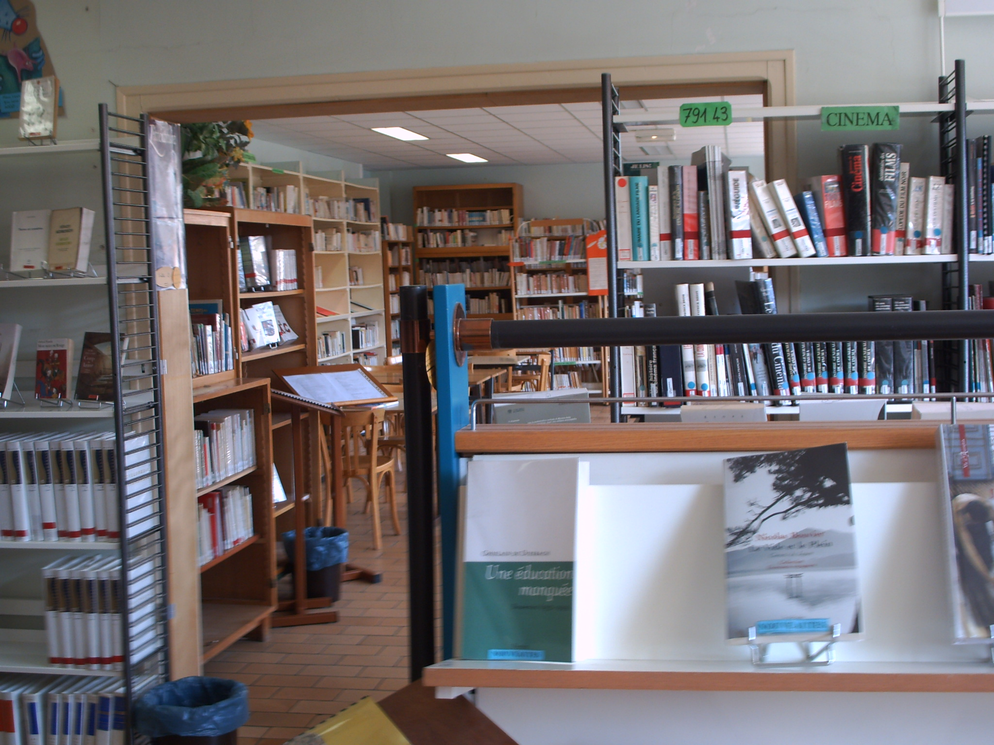 Centre de Documentation et d'Information (CDI) du Lycée Bellevue, Le Mans, France.